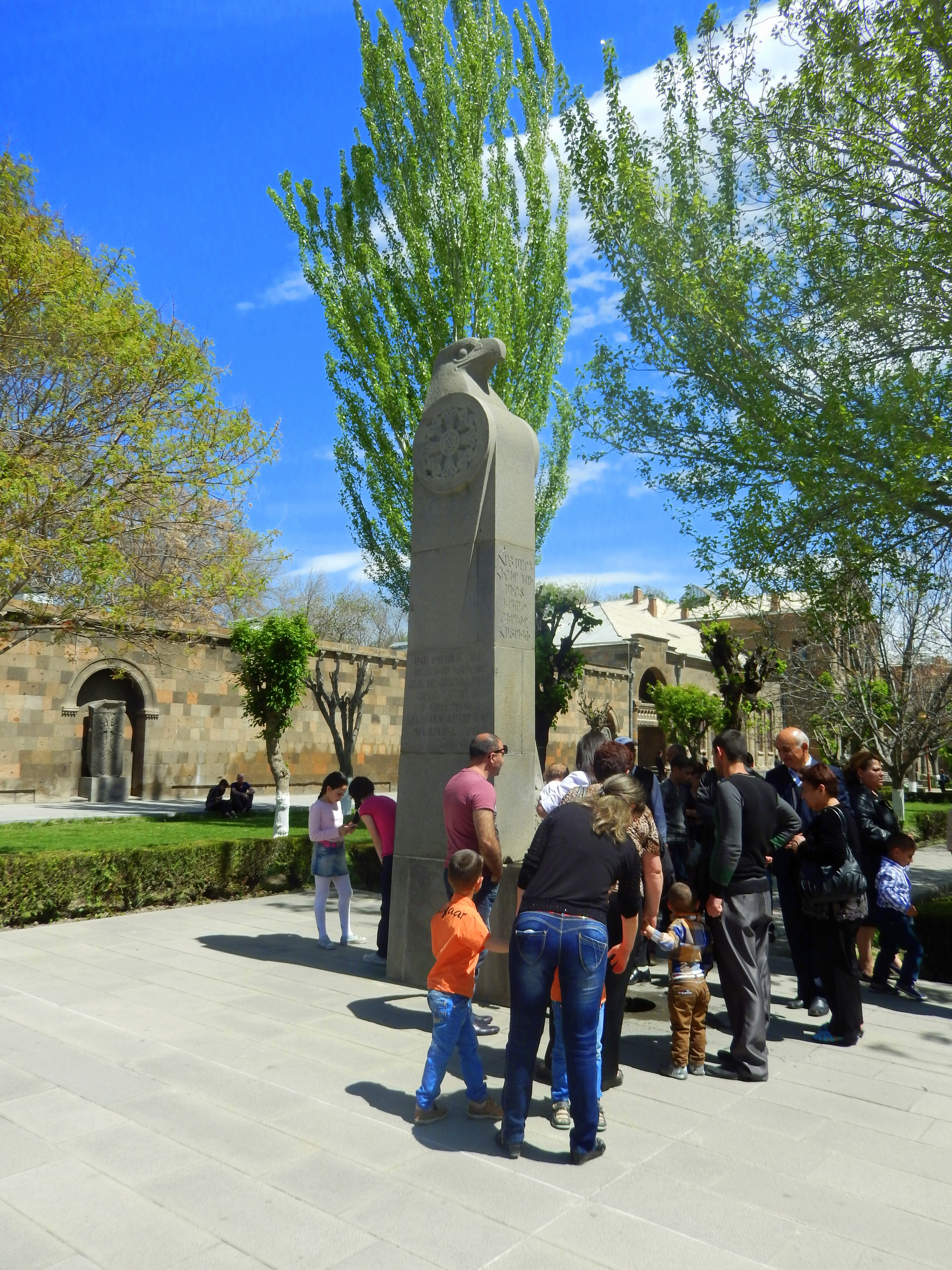 Խրիմյան Հայրիկին նվիրված հուշաղբյուր (Վաղարշապատ) 2/14